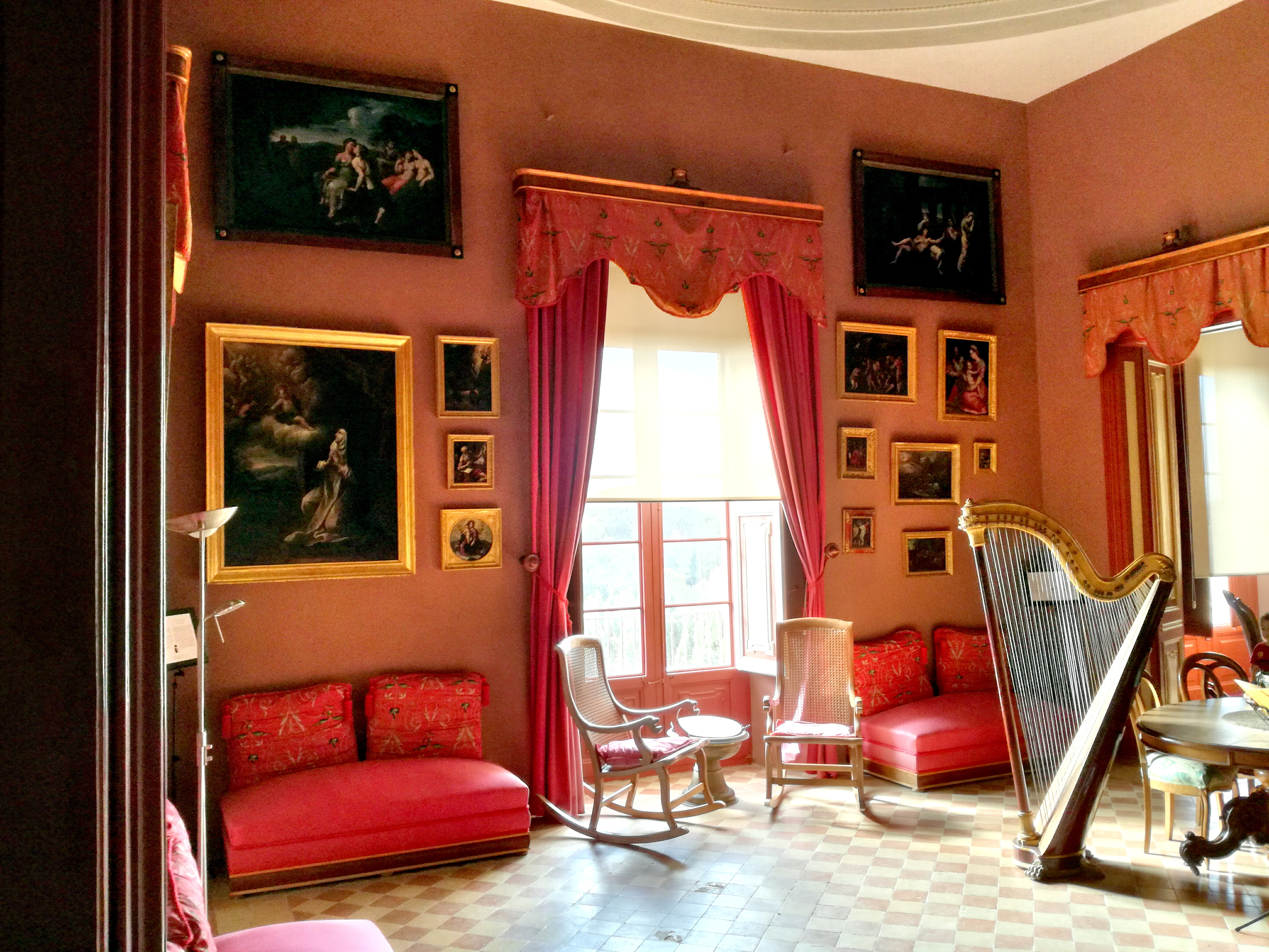 Es poden apreciar el piano vertical Clementí i l'arpa francesa d'estil imperi